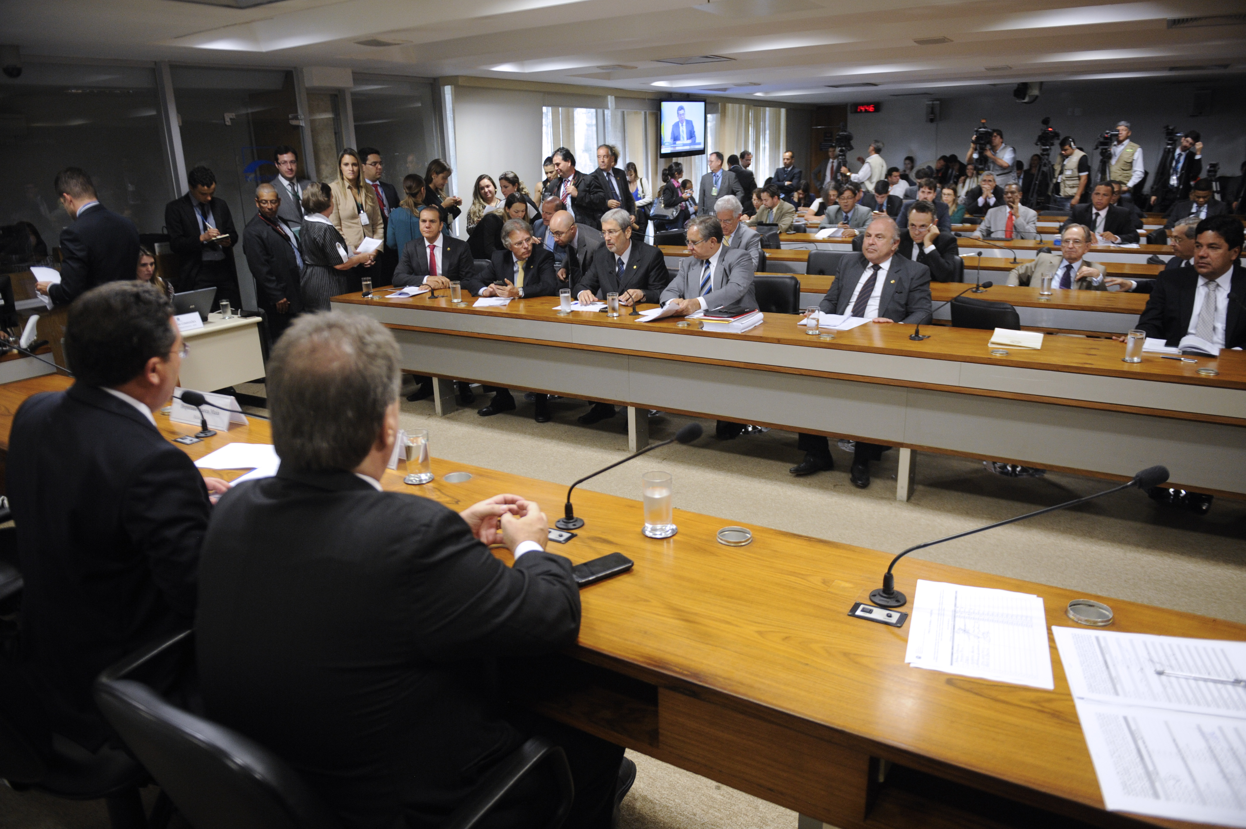 sala de comissões do Senado Federal durante a Comissão Parlamentar Mista de Inquérito (CPMI) da Petrobras. A CPMI faz rreunião administrativa para votação de requerimentos (436). Entre os mais de 400 itens da pauta, estão pedidos de convocação de políticos, como Gleisi Hoffmann, Alvaro Dias, Delcídio Amaral e Aécio Neves. Há ainda convites para que a presidente Dilma e o ex-presidente Lula prestem depoimento. Mesa (E/D): presidente da CPMI da Petrobras, senador Vital do Rêgo (PMDB-PB); senador Gim (PTB-DF). Foto: Jefferson Rudy/Agência Senado